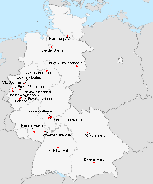 Répartition des clubs en 1.Bundesliga 1983-1984.